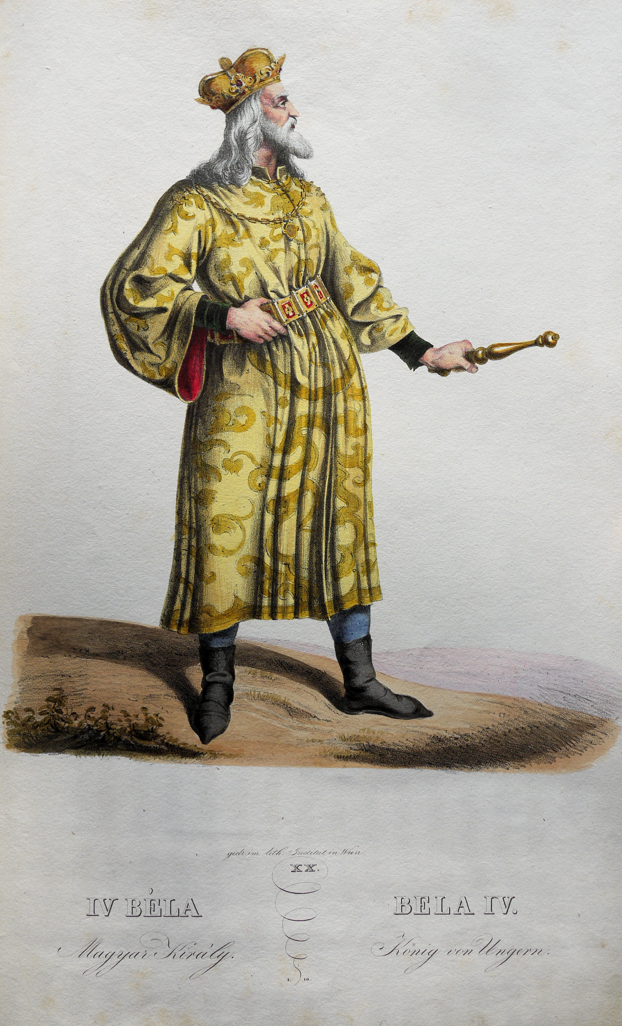 Béla IV. (1206-1270), König von Ungarn etc.; Lithographie von Josef Kriehuber nach einer Zeichnung von Moritz von Schwind aus Ungerns Erste Heerführer Herzoge und Koenige In einer Reihe von Bildnissen von Bela bis auf Seine Majestät Franz I. Kaiser Von Österreich König Von Ungern &c., &c. Wien : Lithographisches Institut ;ca. 1828